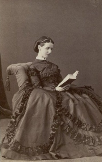 Баронесса Анна Карловна Пилар фон Пильхау (1832—1885)